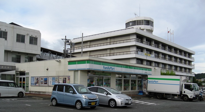 ファミリーマート秦野市役所前店に併設されている秦野市観光協会事務所